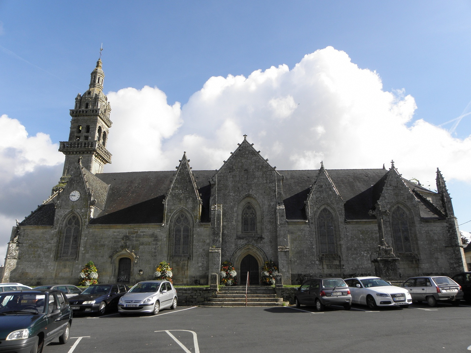 Vue méridionale de l'église Saint-Pierre et Saint-Paul de Gourin (56).